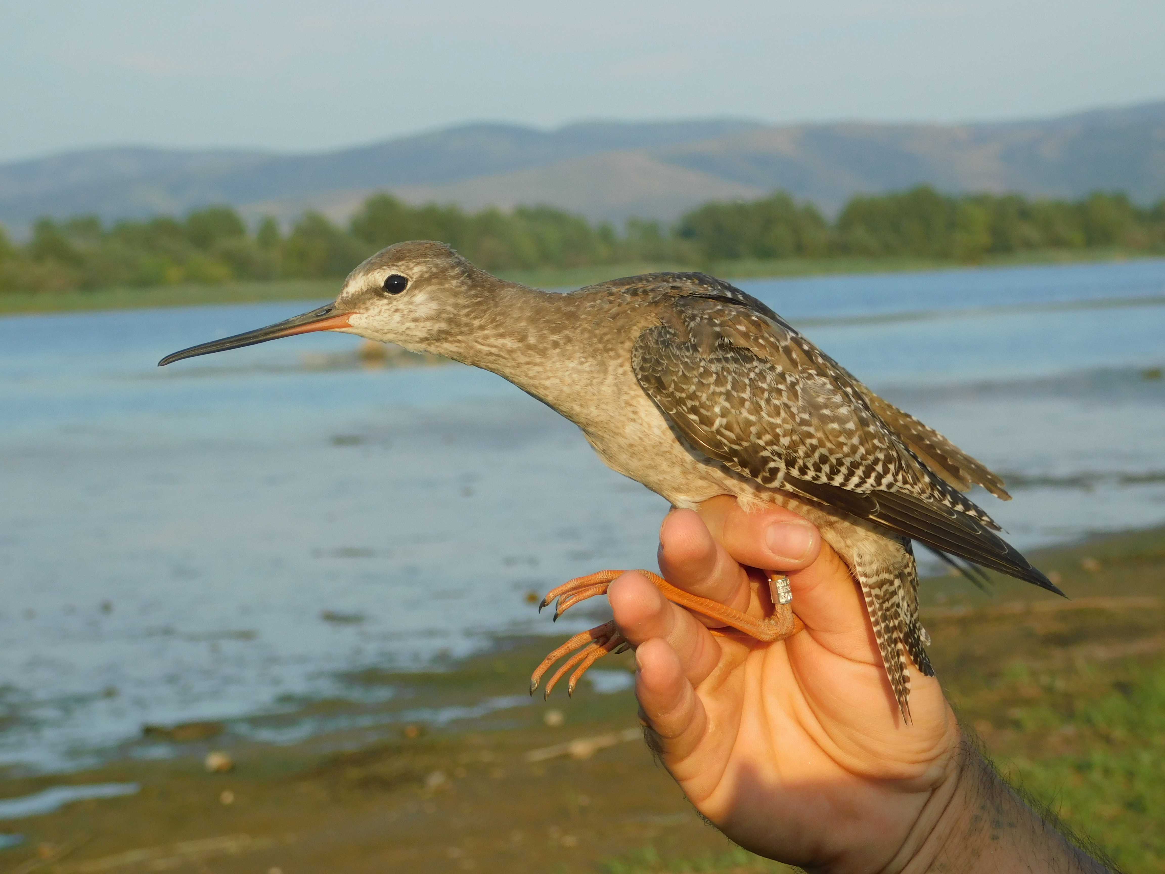 Srpski (latinica): Crni sprudnik se gnezdi u tundrama Evroazije. U Srbiji se sreće tokom seobe. Ptica je prstenovana u Specijalnom rezervatu prirode ,,Labudovo okno".